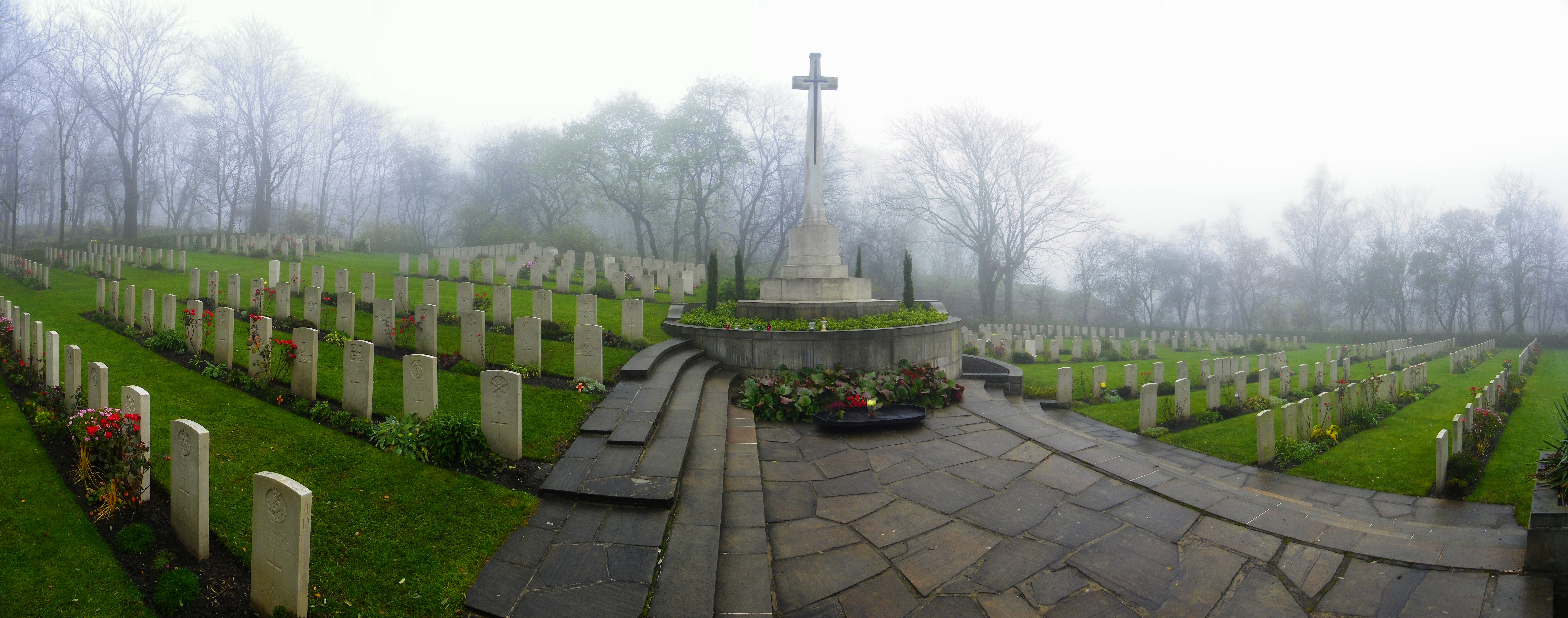 Cmentarz Brytyjski na Cytadeli w Poznaniu